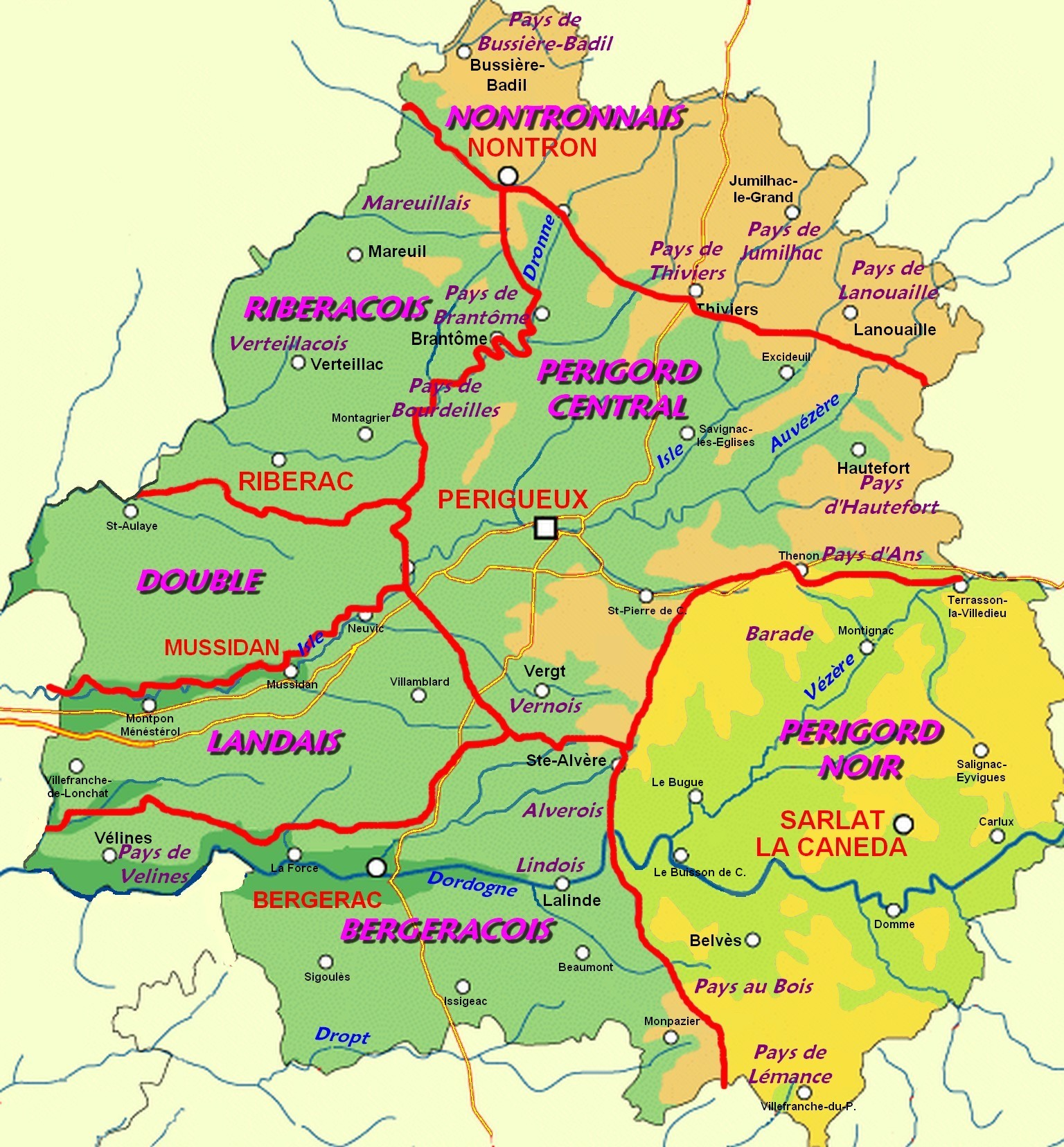 Localisation du Périgord Noir sur la carte des pays traditionnels du Périgord